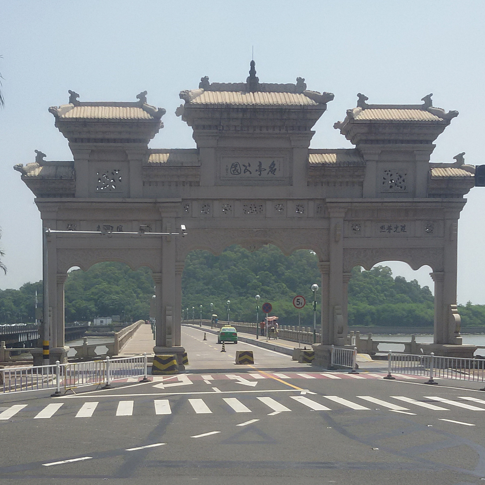 粵語: 野狸島同名亭公園嘅牌坊